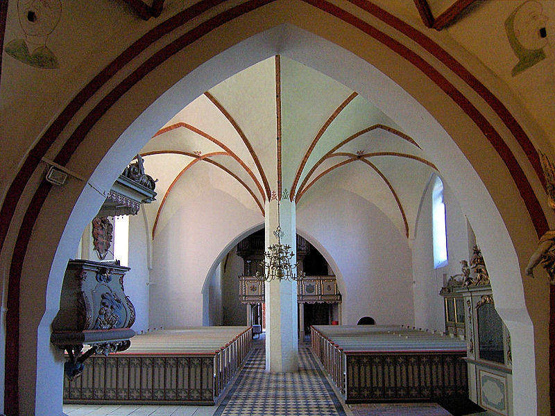 Kirche in Prohn, Innenraum, Mecklenburg-Vorpommern